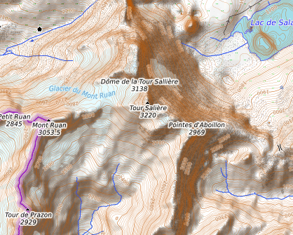 carte réalisée sur umap This map may be incomplete, and may contain errors. Don't rely solely on it for navigation.